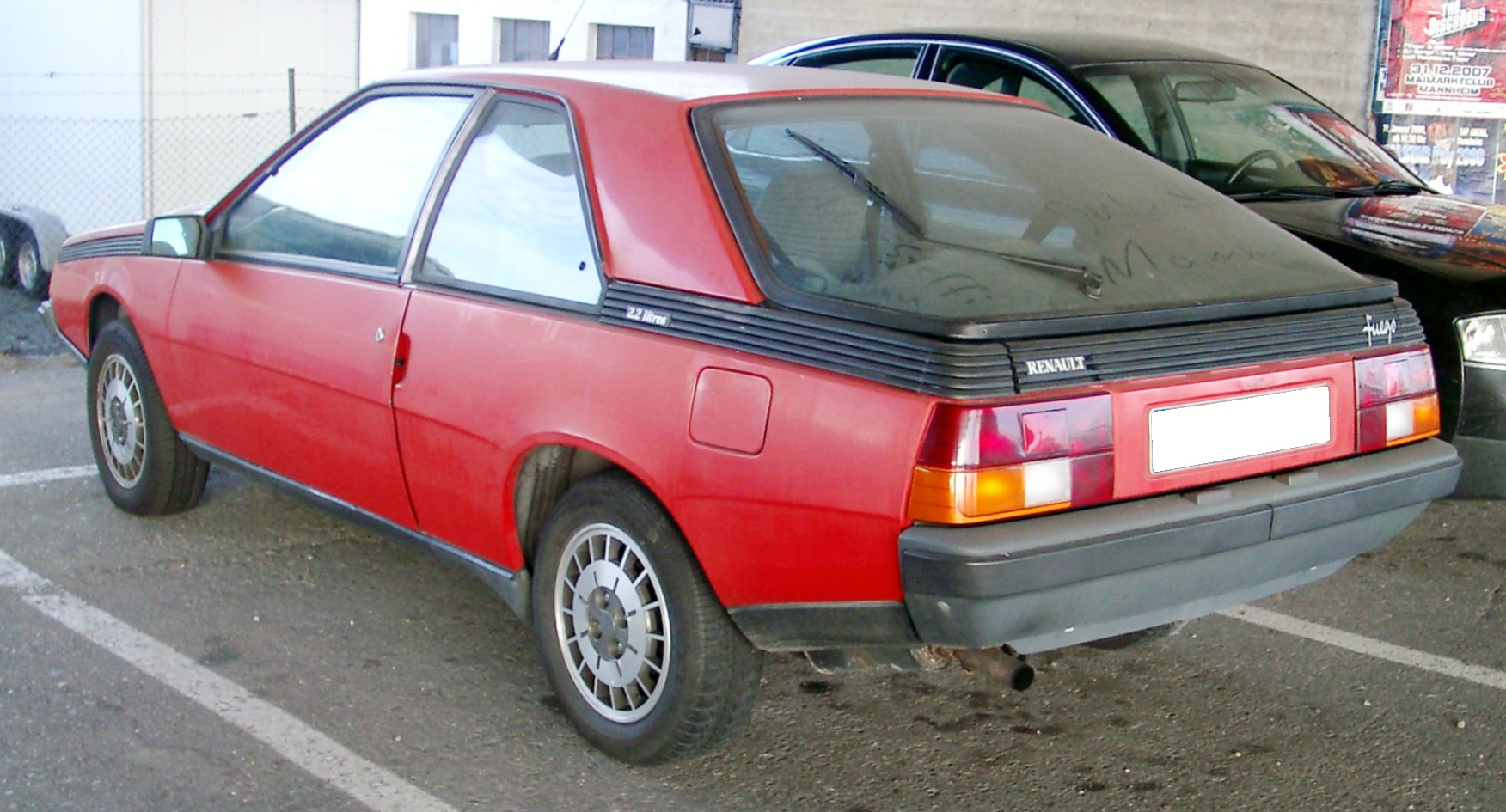 Renault Fuego